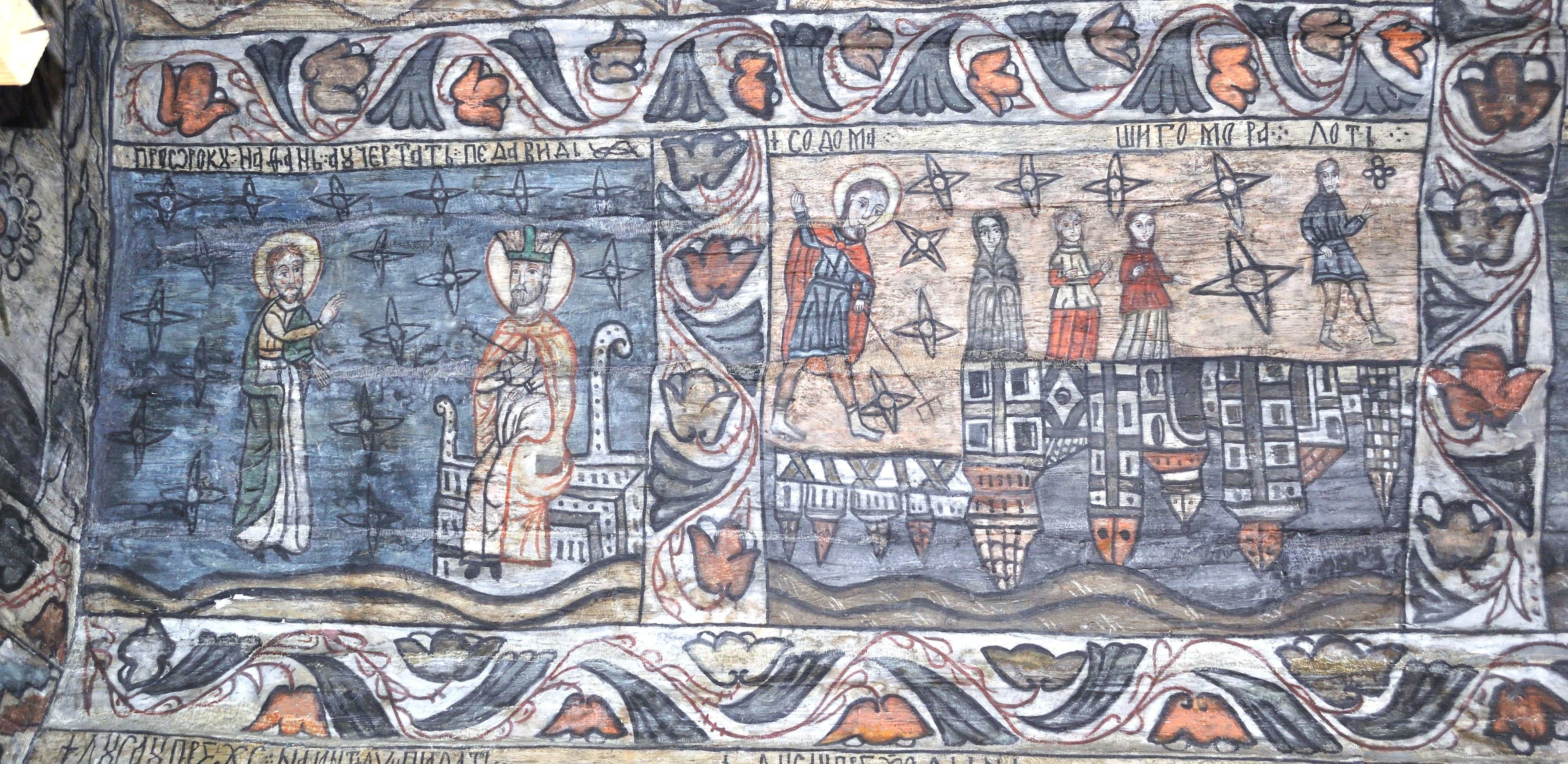 Biserica de lemn „Cuvioasa Paraschiva" din Desești, județul Maramureș